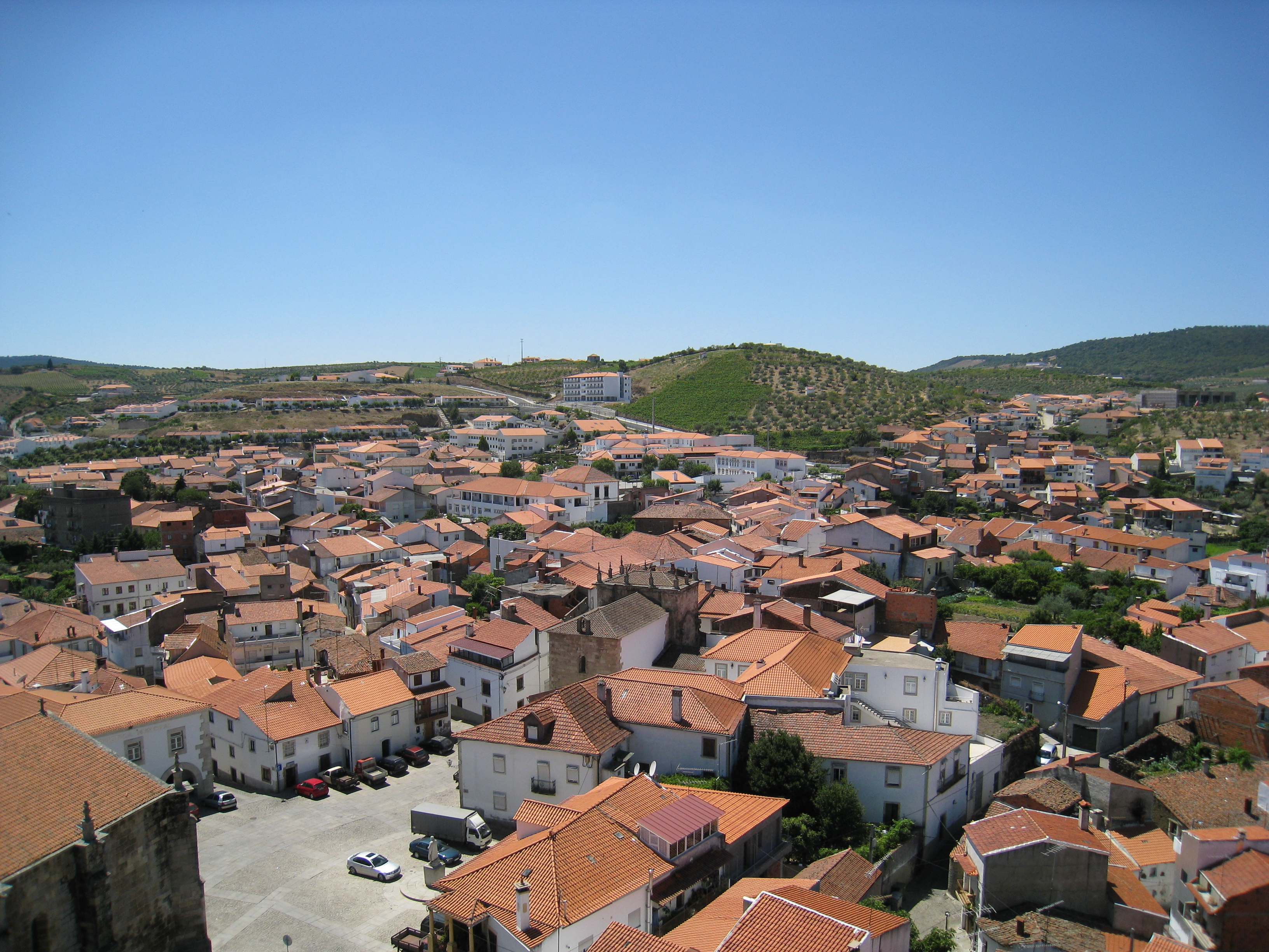 Freixo de Espada à Cinta